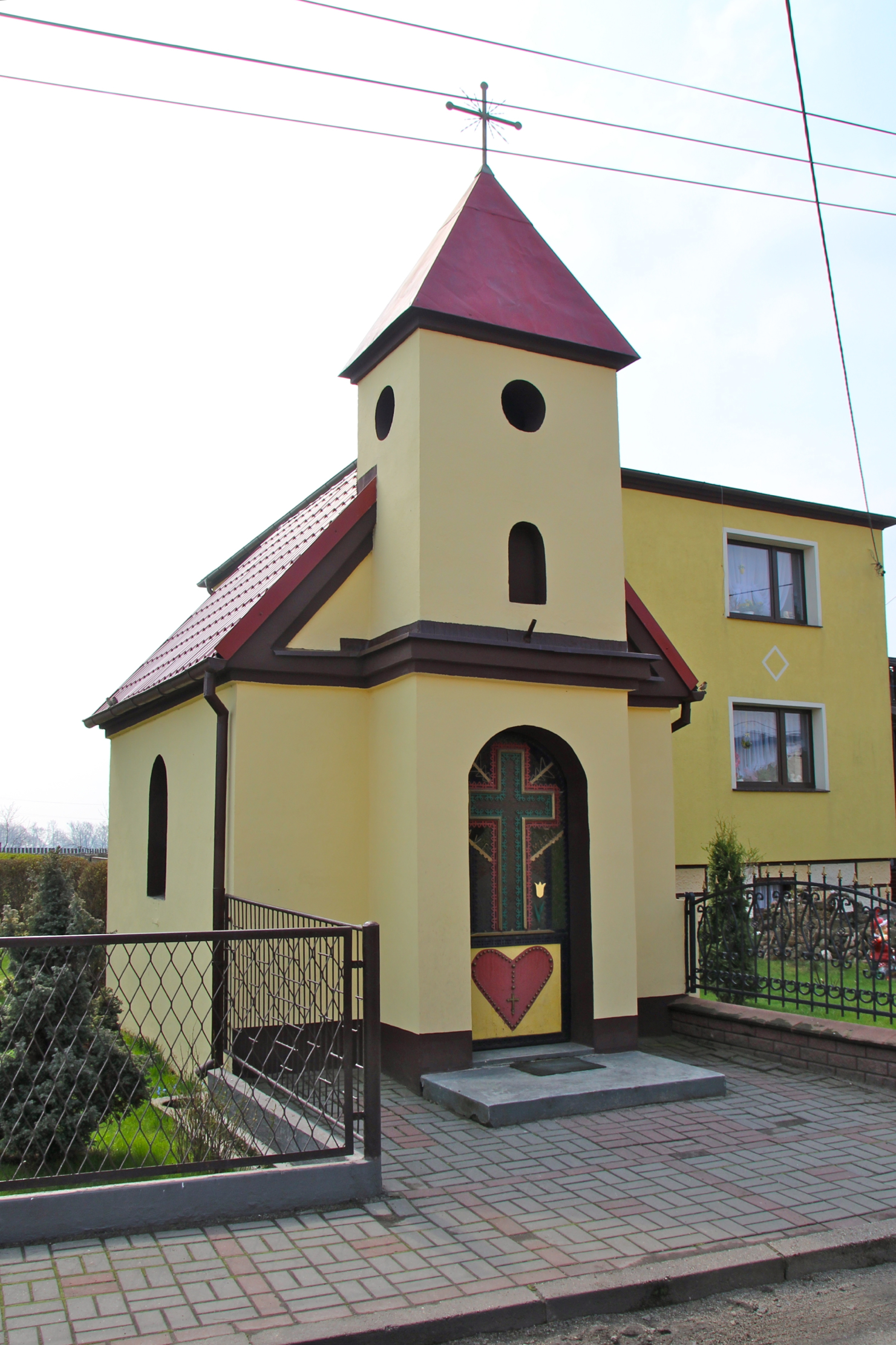 Bytków, (dodatkowa nazwa w j. niem. Pickau), – wieś w Polsce w województwie opolskim, w powiecie kędzierzyńsko-kozielskim, w gminie Reńska Wieś.